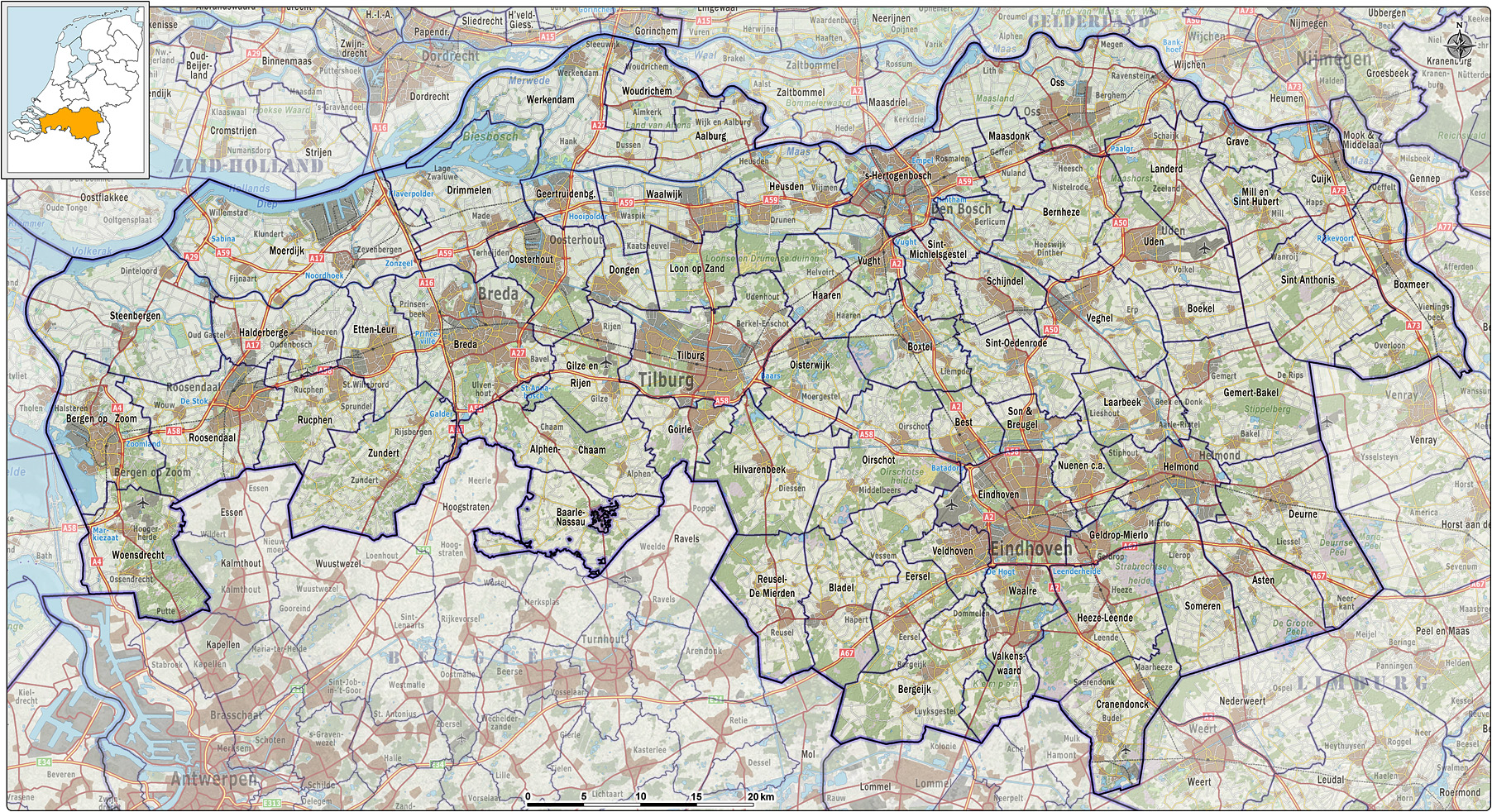 Kaart van de Nederlandse provincie Noord-Brabant, met gemeentegrenzen per 2012 en impressie van het landschap. Referentie-ondergrond (kustlijn, steden, wegen) gerasterd uit de OpenStreet Map OSM. Inhoud is beschikbaar onder de Creative Commons Attribution-ShareAlike 3.0 license. Referentie-ondergrond op water bewerkt vanuit Gebruik is vrij met bronvermelding NLR en ESA. Vectorgrenzen van gemeenten op basis van het vrij te gebruiken geo-bestand van het CBS. Hoogte-aanduidingen (reliëf) gerasterd uit de AHN Viewer ( gebruik is vrij met bronvermelding (c) AHN, Overige kenmerken op de kaart: eigen tekenwerk.